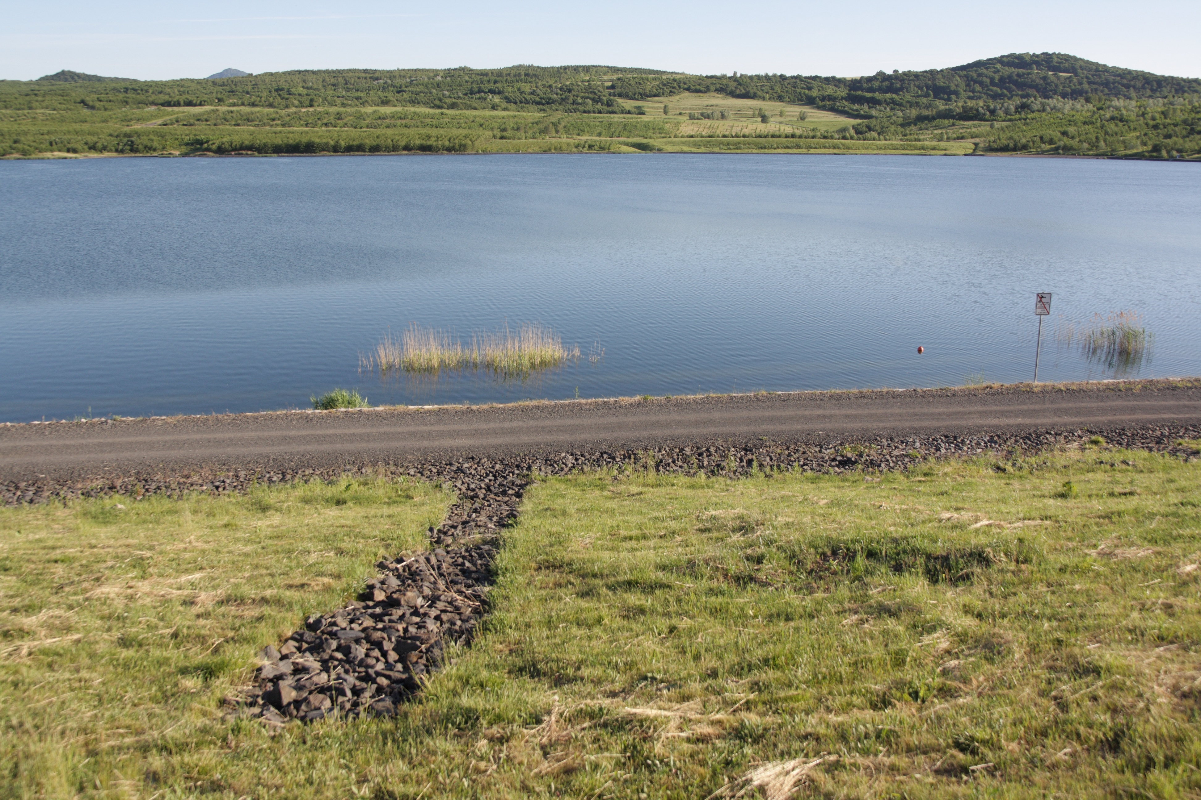 Jezero Milada - pohled ze severního svahu